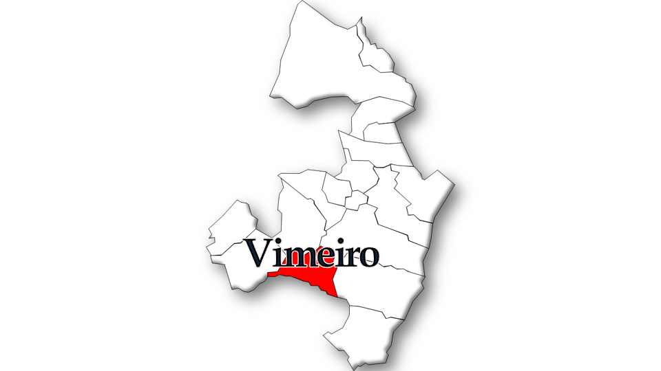 População